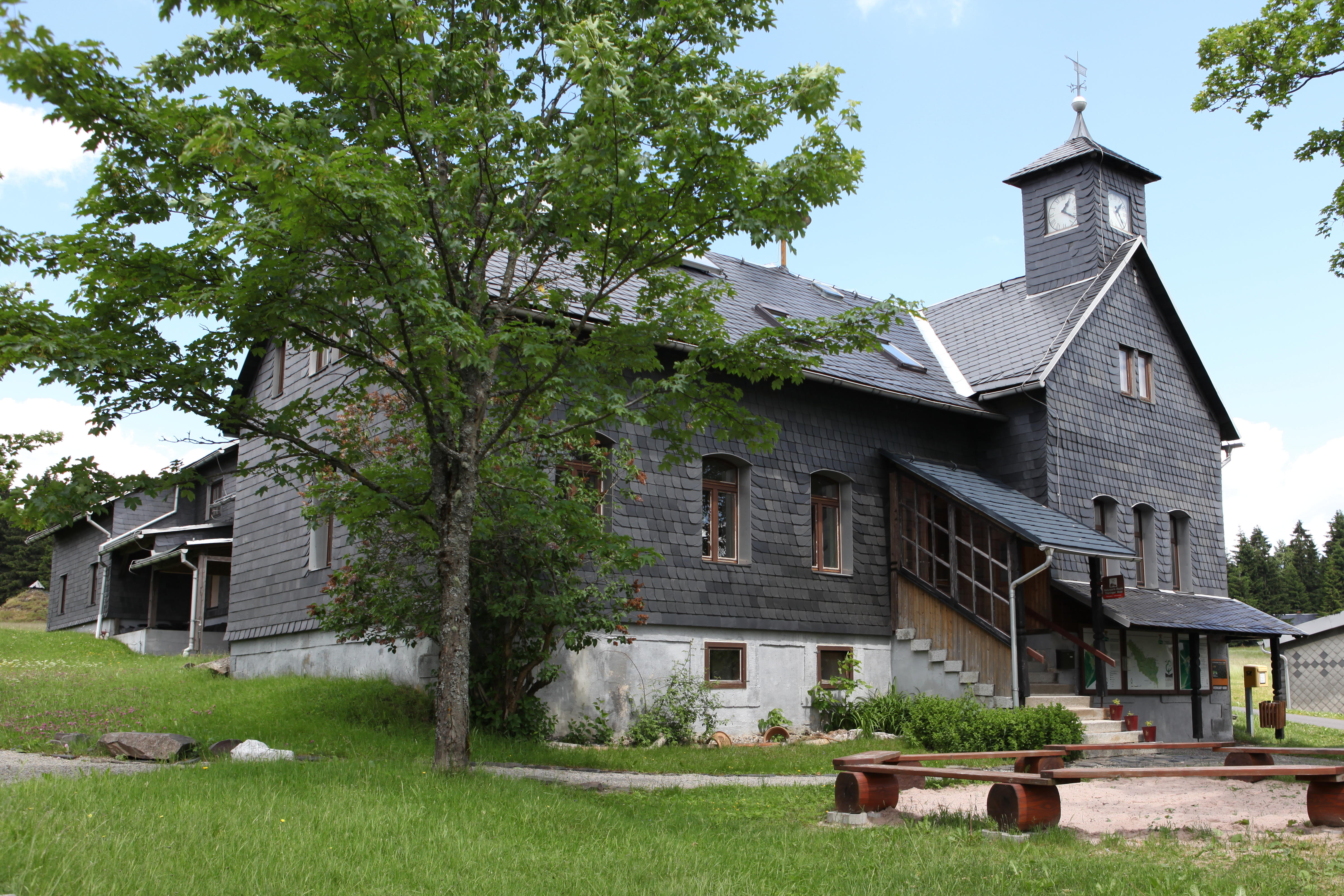 Naturparkzentrum Thüringer Wald (Ehemalige Schule), Friedrichshöhe, OT von Sachsenbrunn, im Landkreis Hildburghausen